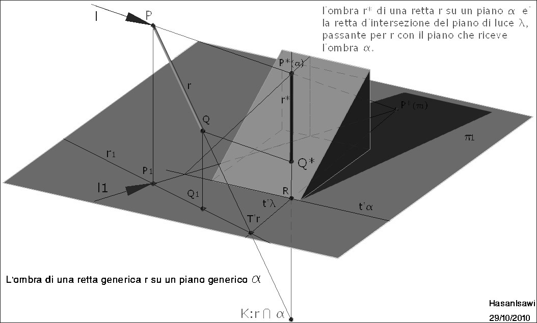 Geometria descrittiva Teoria delle ombre ombra di una retta generica r su un piano generico α Per determinare l'ombra di r su α, occorre determinare l'ombra di due punti di r su α. Per determinare l'ombra di un punto P di r, si procede come segue: 1- l'ombra del punto P su α, si determina come punto d'intersezione P* del raggio luminoso l passante per P con α, per fare questo: - si fa passare per l un piano verticale β che interseca α secondo una retta s. e cosi si individua l'ombra P* del punto P sul piano α. Per determinare l'ombra di un secondo punto di r su α, si può continuare cosi: - si determina l'ombra r* di r sul primo piano di proiezione π1 e cosi si individua la prima traccia t'λ del piano di luce λ passante per r ( ovvero la retta d'intersezione tra i piani α e λ). - si individua la prima traccia R del ombra r* come intersezione tra le tracce t'λ e t'α. Una volta determinata l'ombra R di un secondo punto della retta r su α, si unisce con P* e cosi si individua l'ombra r* di r su α. In ultimo, l'ombra del secondo estremo Q di r, si individua come punto d'intersezione tra r* su α e il raggio luminoso passante per Q. Sito dell'autore